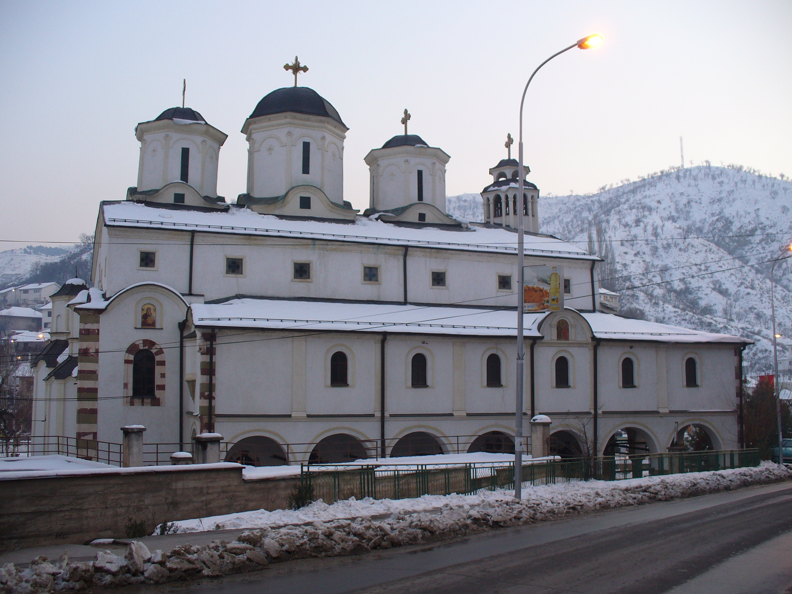 Църквата Свети Никола в Щип, Република Македония.